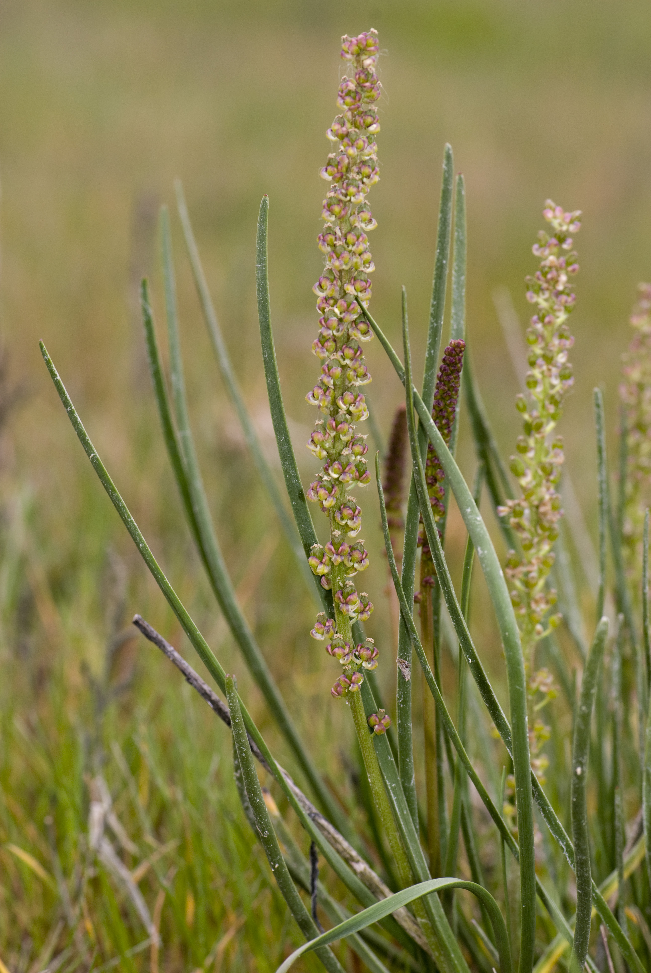 Triglochin maritima Baie d'Authie (Somme), France